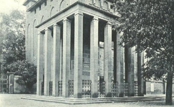 Kants 2. Grabstätte